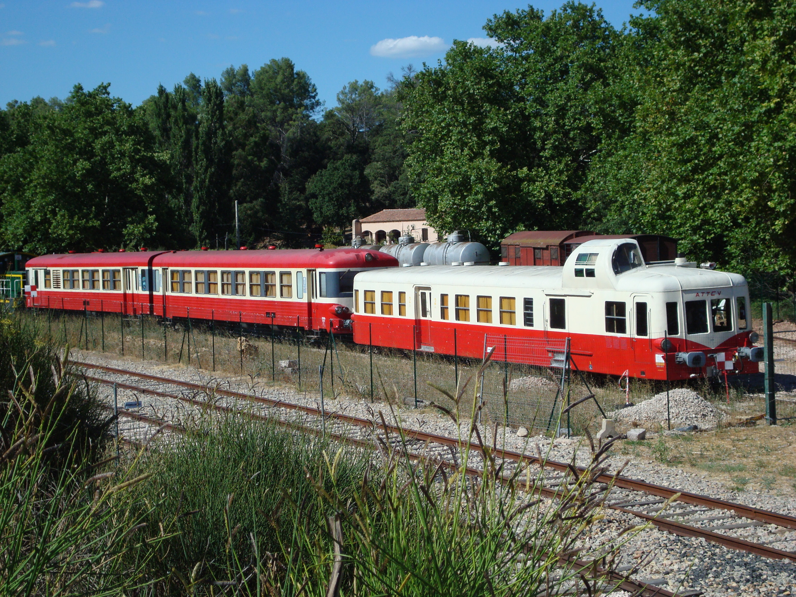 Dépôt de l'ATTCV à Besse-sur-Issole. Débord de la gare de Besse-sur-Issole